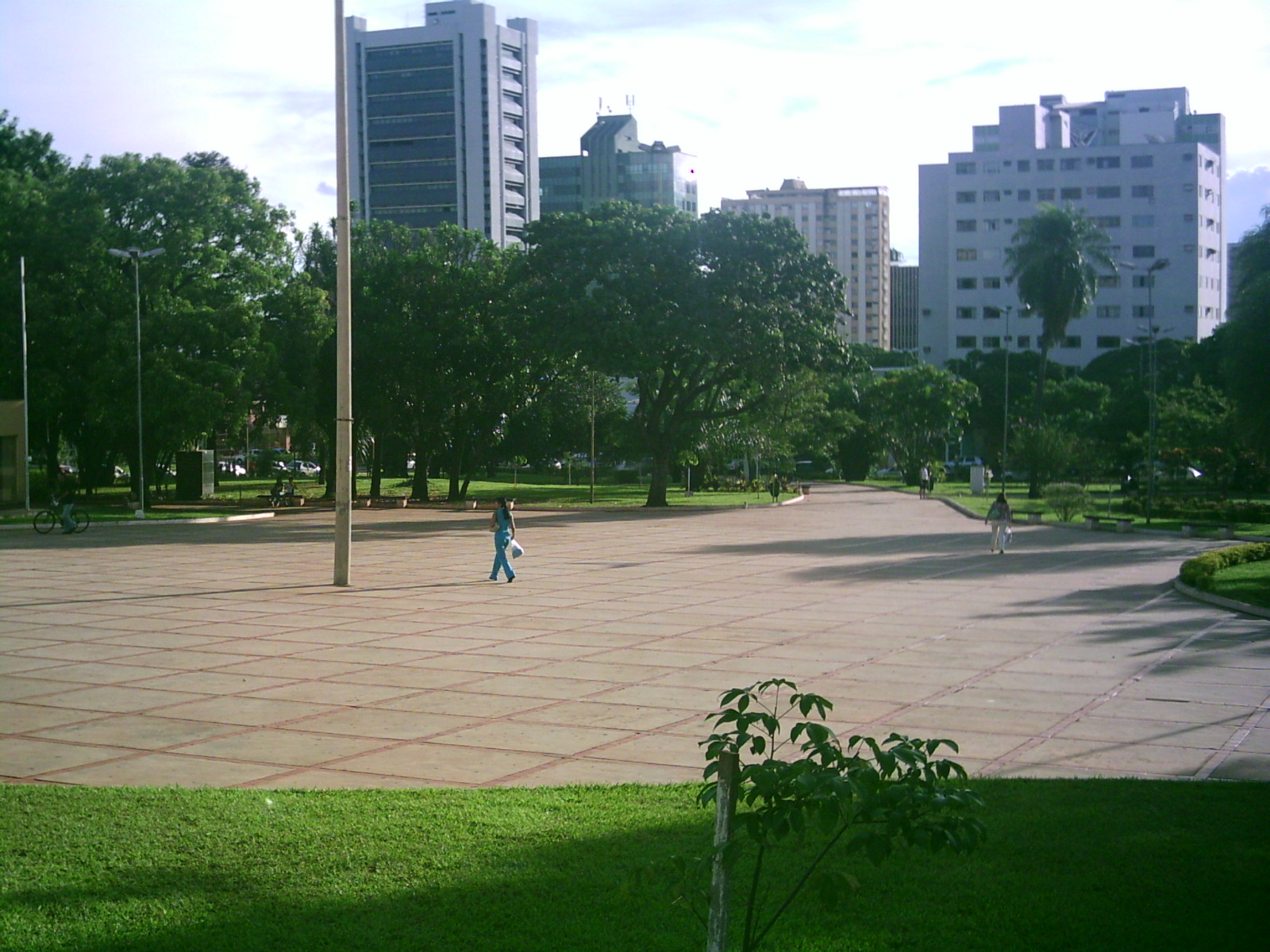 Foto da Praça da República - Campo Grande